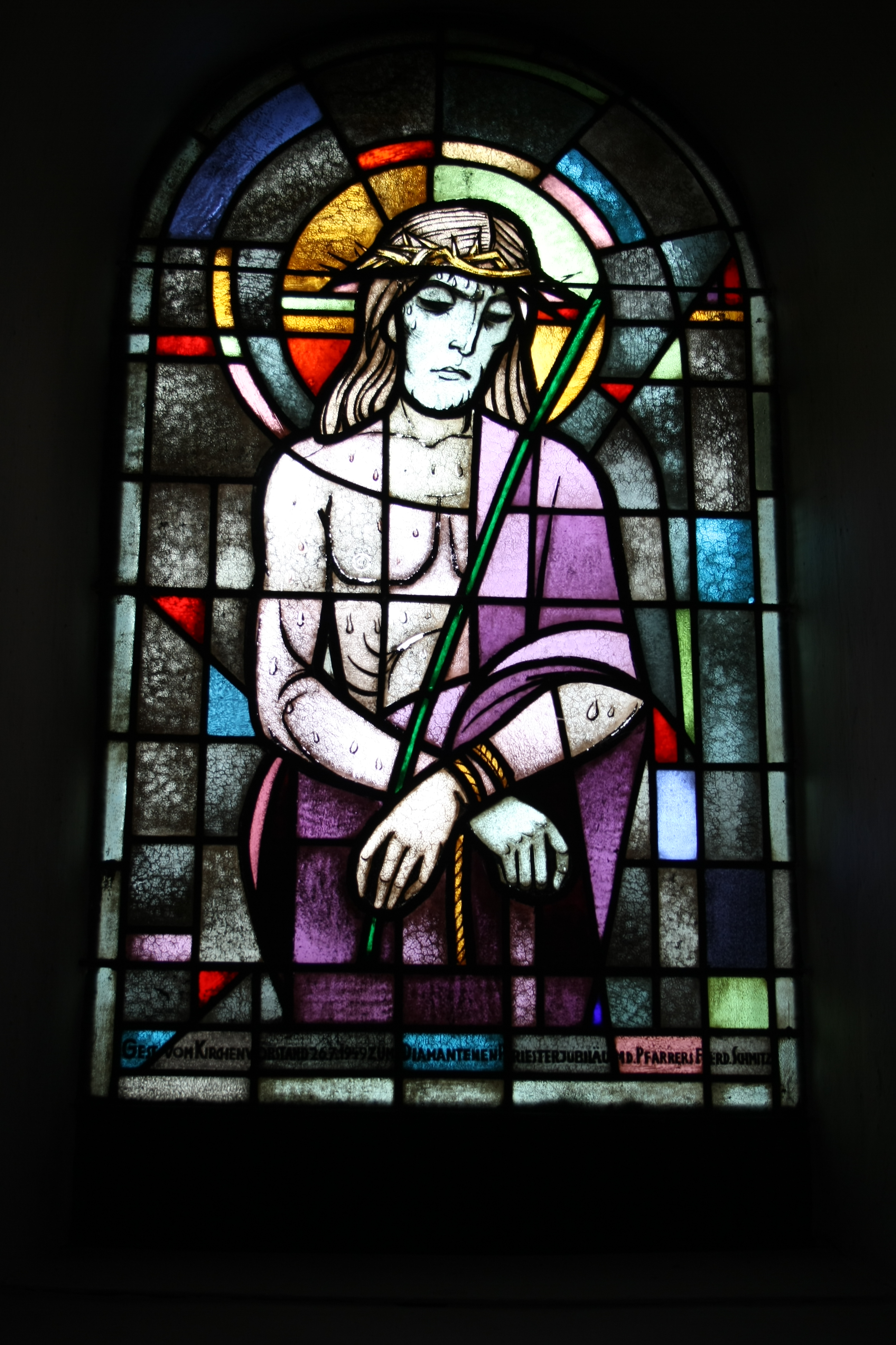 Katholische Kirche St. Georg in Fritzdorf, Bleiglasfenster im Vorraum, Darstellung: Jesus mit Fesseln und Dornenkrone